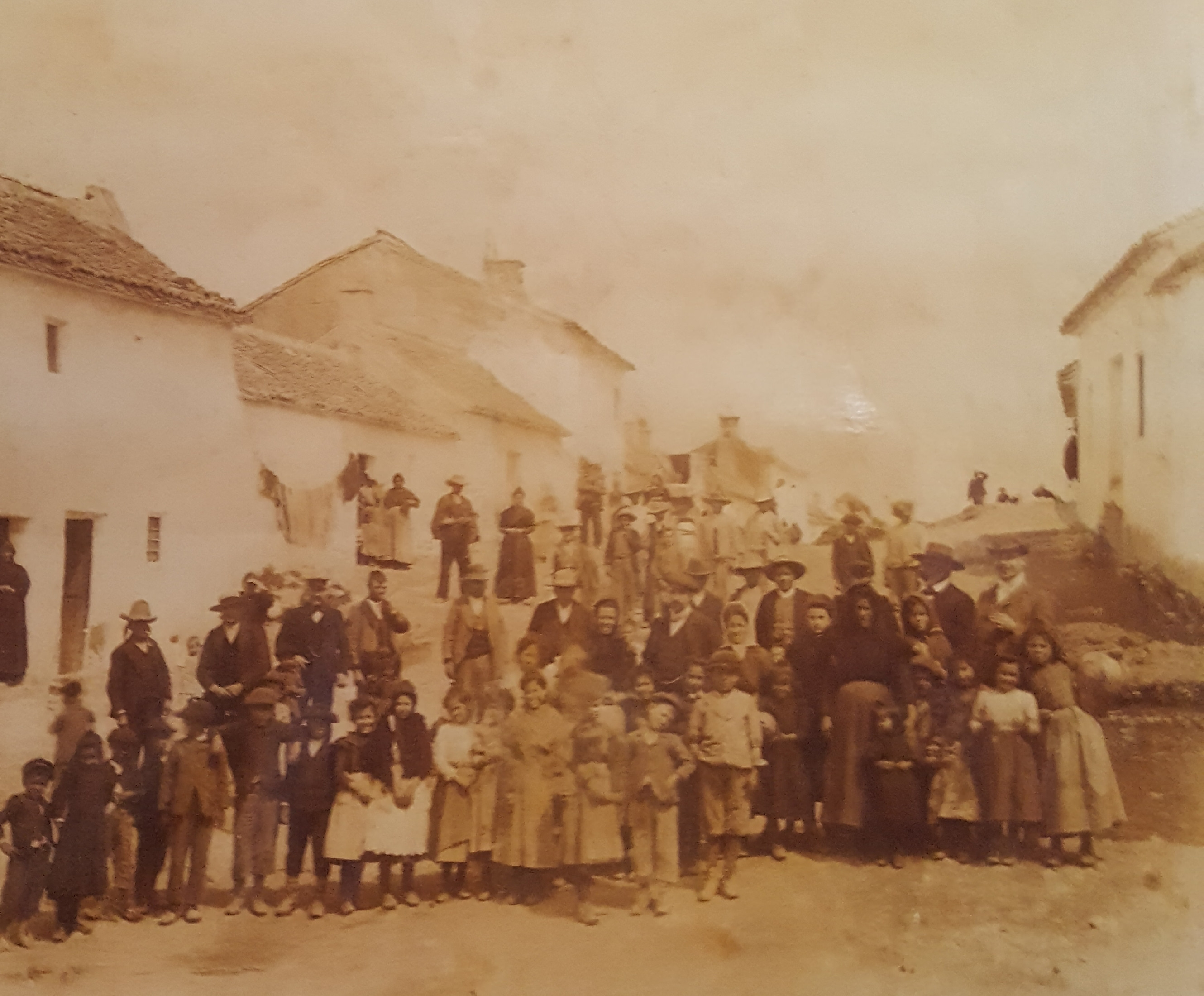 Imagen tomada en el Barrio Alto de Láchar (Granada, España) a principios del siglo XX. Actualmente es la calle Ancha de dicha localidad, vista desde el oeste hacia el este.